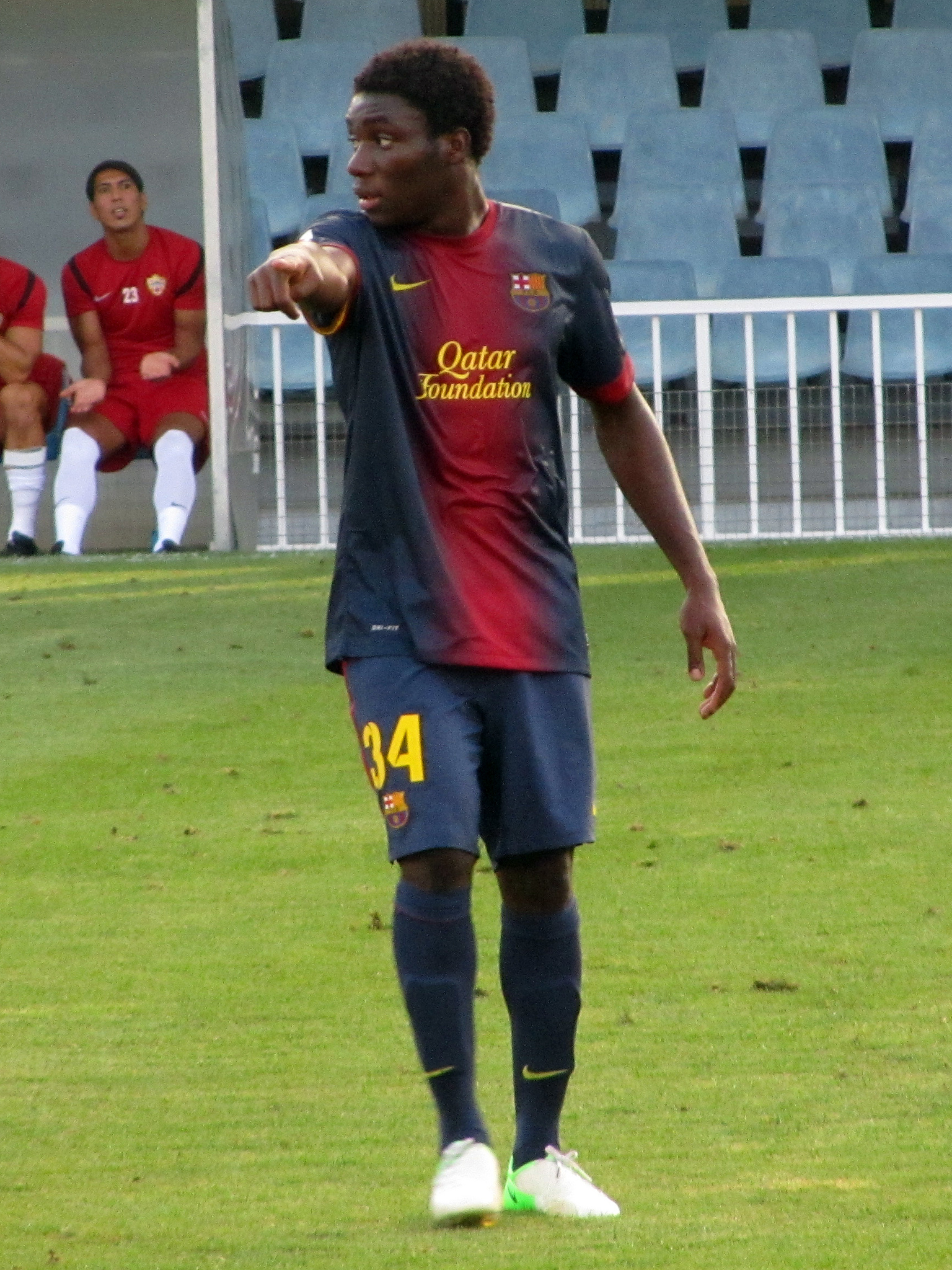 Foto realizada por Javier Segura (@castroquini)